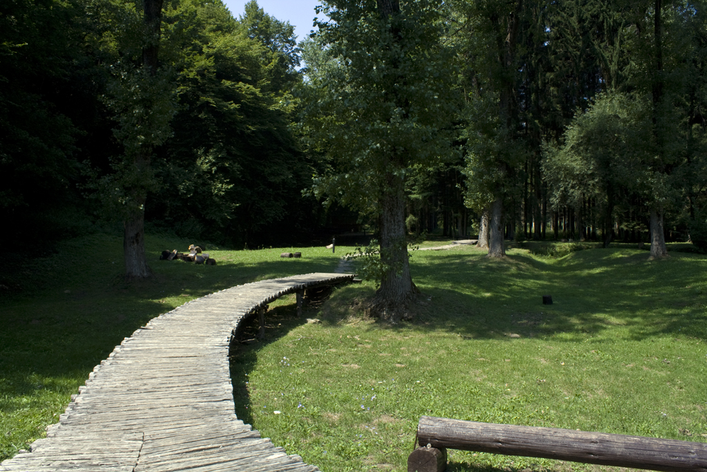 Šetalište podno Baraćevih špilja